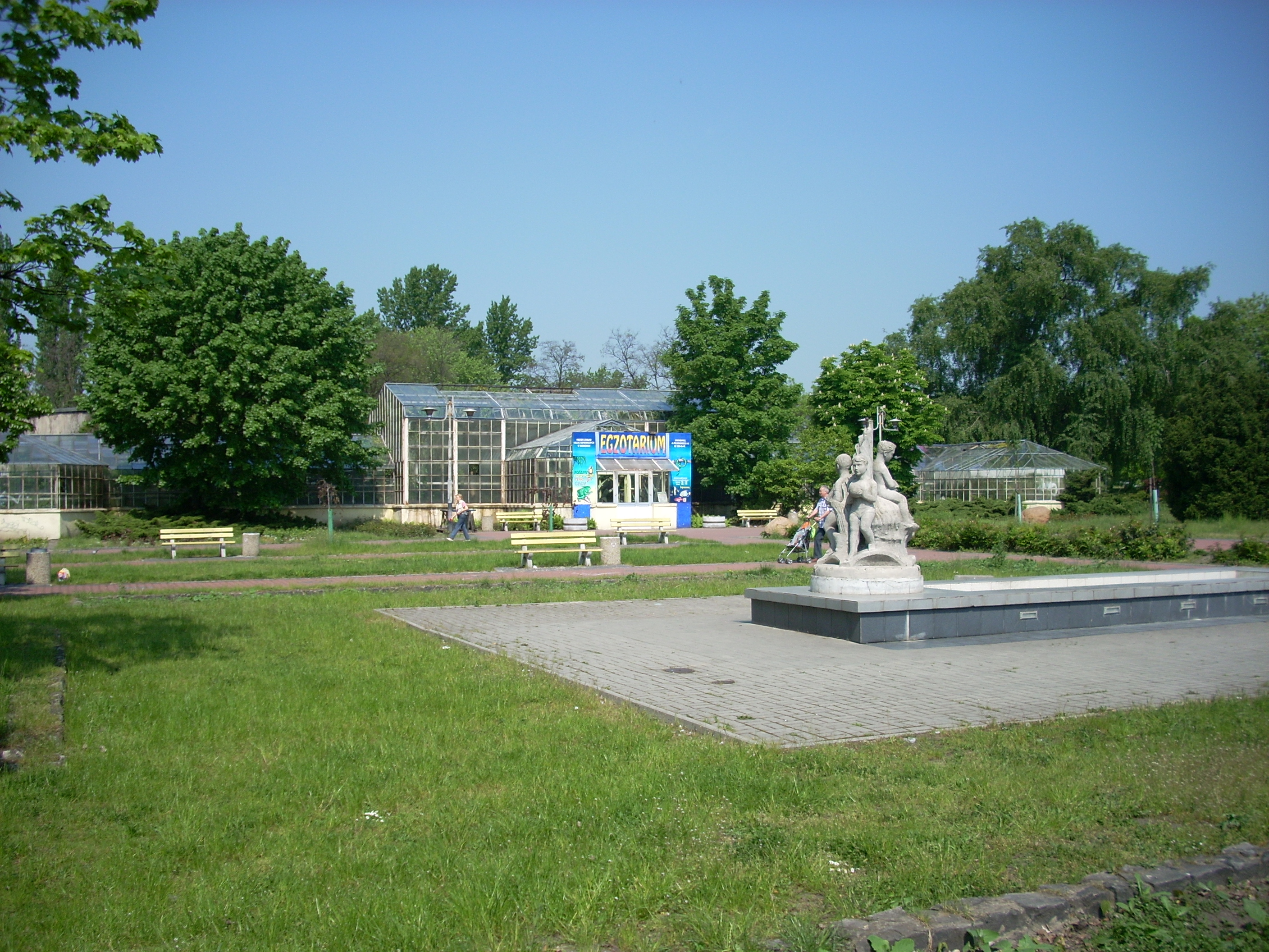 Egzotarium w Sosnowcu Starym Sosnowcu